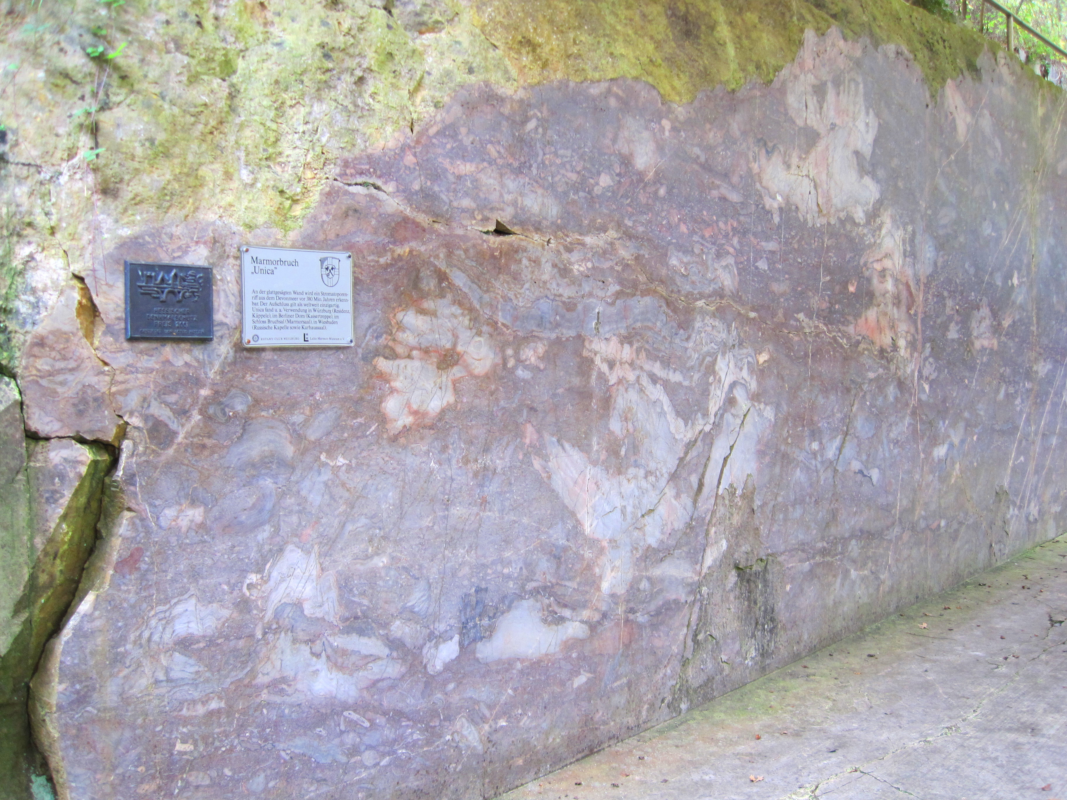 Polierte Abbauwand im Marmorbruch Unica in Villmar. Hessischer Denkmalschutzpreis 2001.